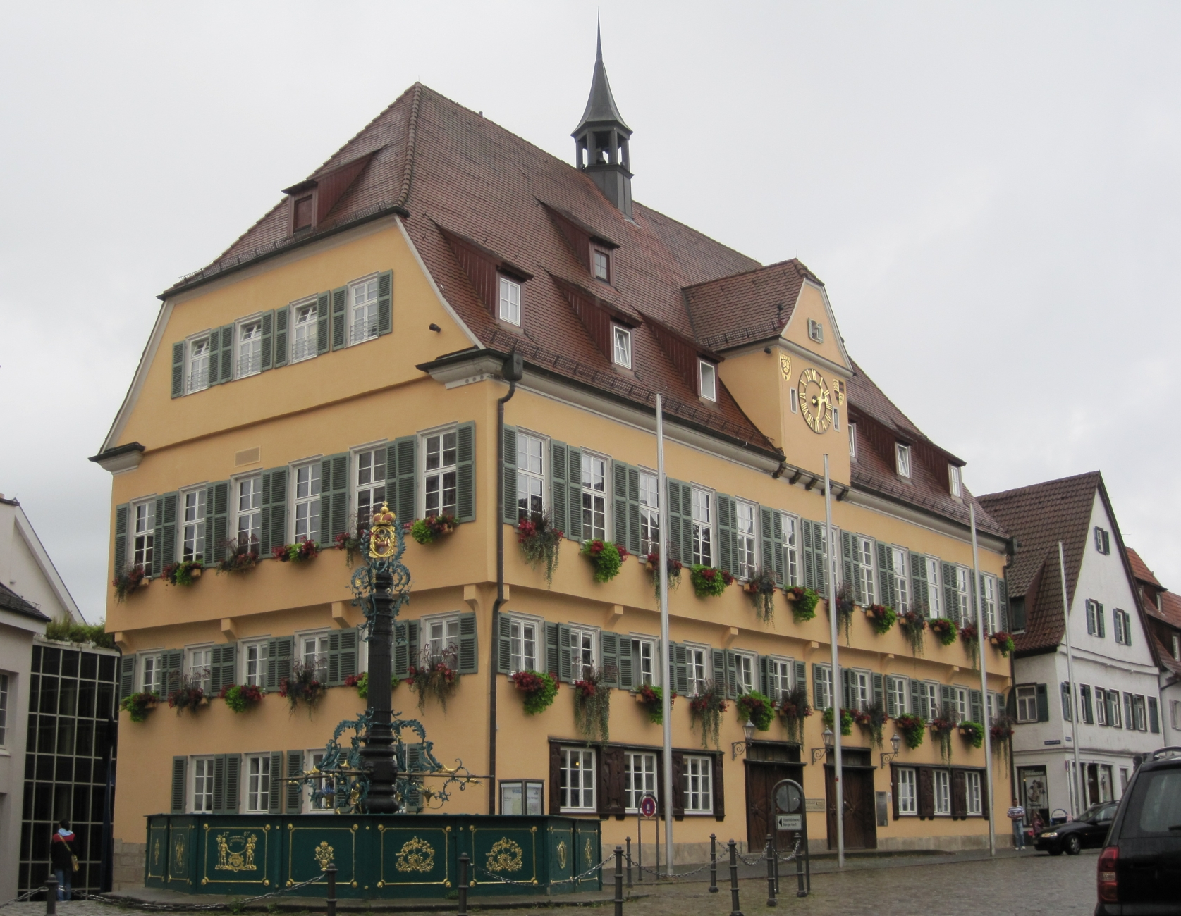 Das alte Rathaus in Nürtingen mit dem Marktbrunnen